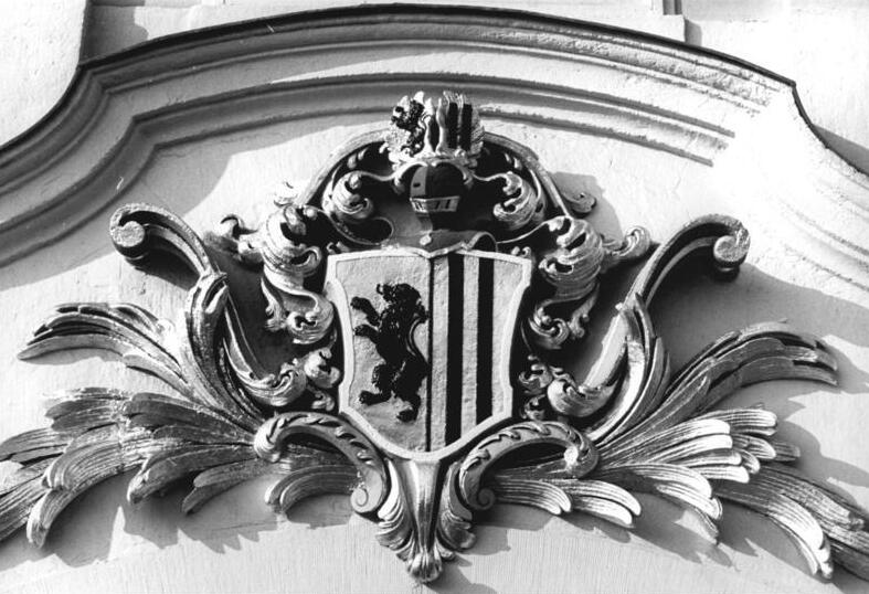 Dresden, Gewandhaus, Portal, Stadtwappen ADN-ZB Häßler 21.11.1986 Dresden: Das Wappen der Stadt Dresden schmückt das Portal des Gewandhauses im Zentrum der Elbestadt, das sich nach einer Renovierung in leuchtenden Farben präsentiert. Das Gebäude wurde in den Jahren 1768-70 errichtet und nach der Zerstörung im Krieg von 1965-67 wieder aufgebaut. Es dient heute als Hotel. (siehe 1986-1121-004)